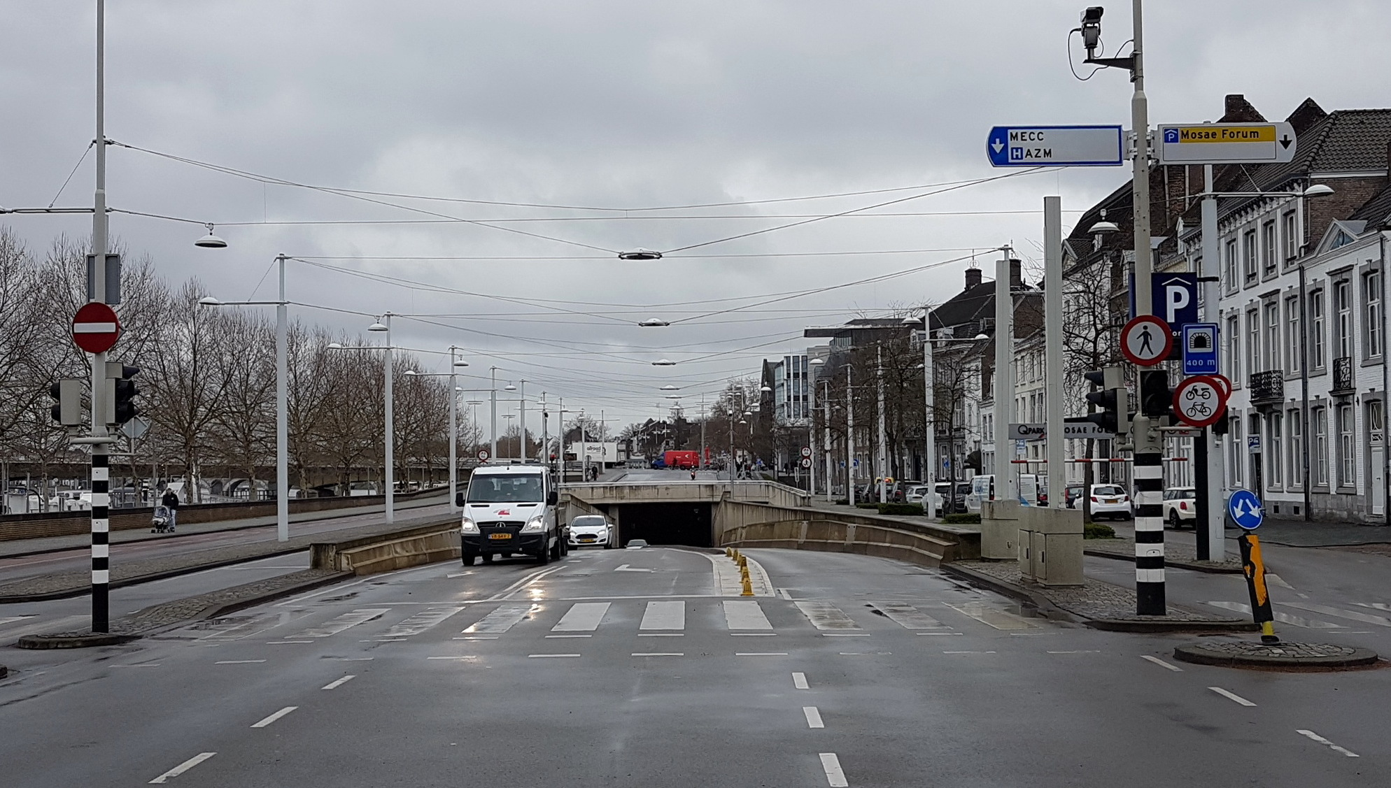 Zicht vanuit het noorden van de tunnelingang van de Maasboulevard in Maastricht.